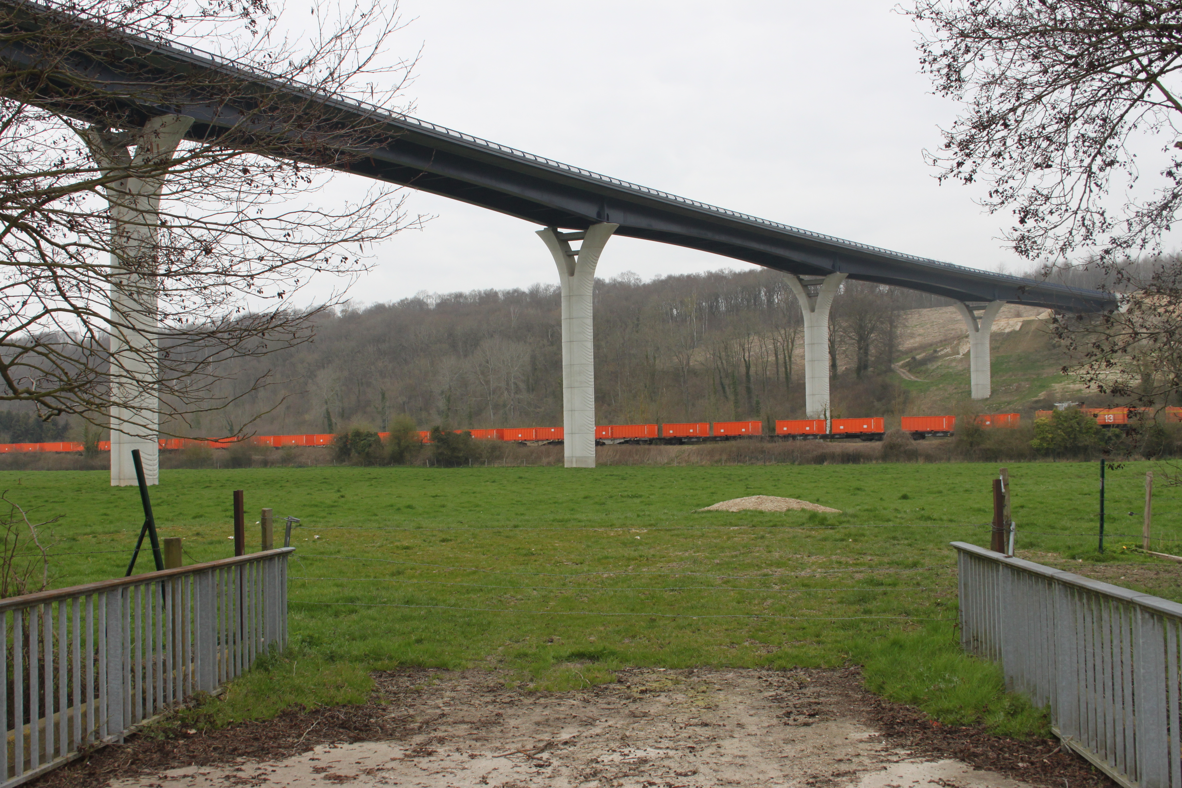 Ligne de Malaunay à Dieppe, viaduc de la Scie et train de terre COLAS RAIL tracté par les Vossloh G 1206 n°10 et 13 à destination du Terminal Forestier du port de Rouen .